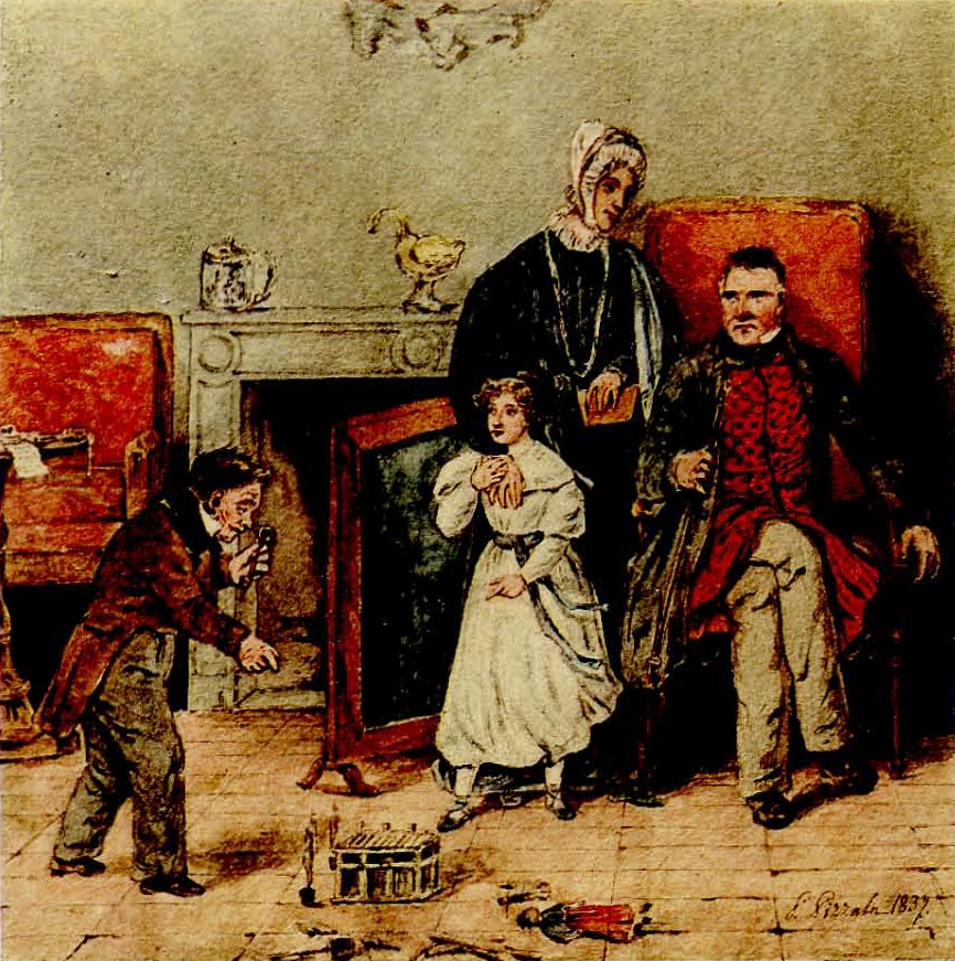 Eustachy Sanguszko z żoną Klementyną, wnuczką Marią i karzełkiem "Panem Jakubciem"